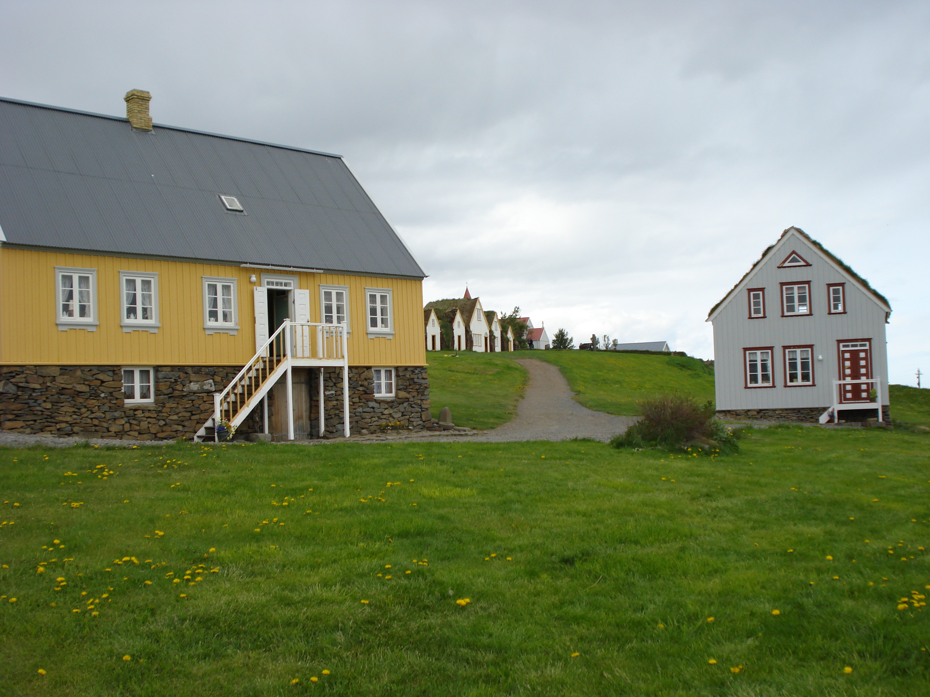 Glaumbaer